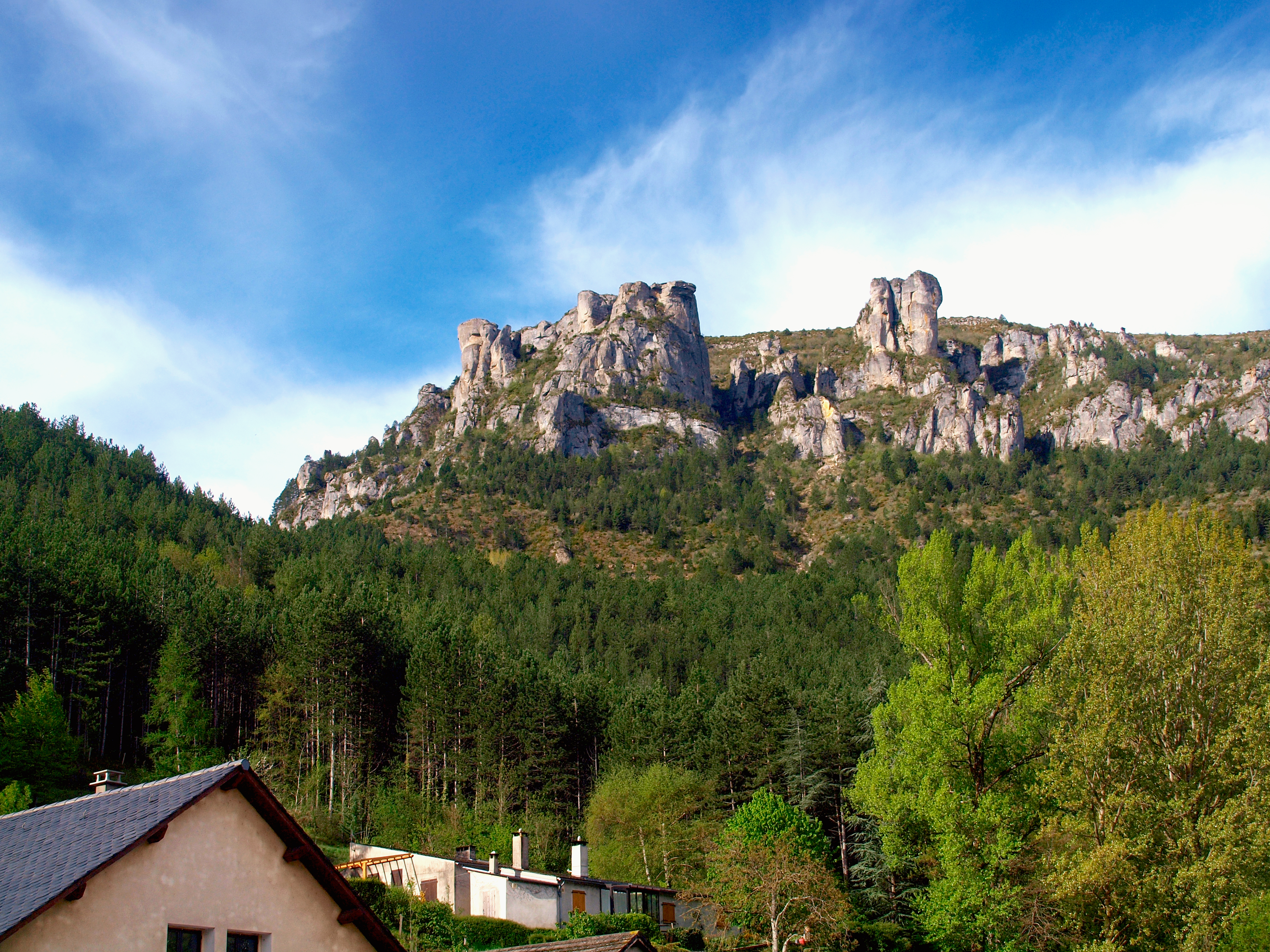 Florac (Lozère) - Contreforts du Causse Méjean au Sud-ouest de la ville